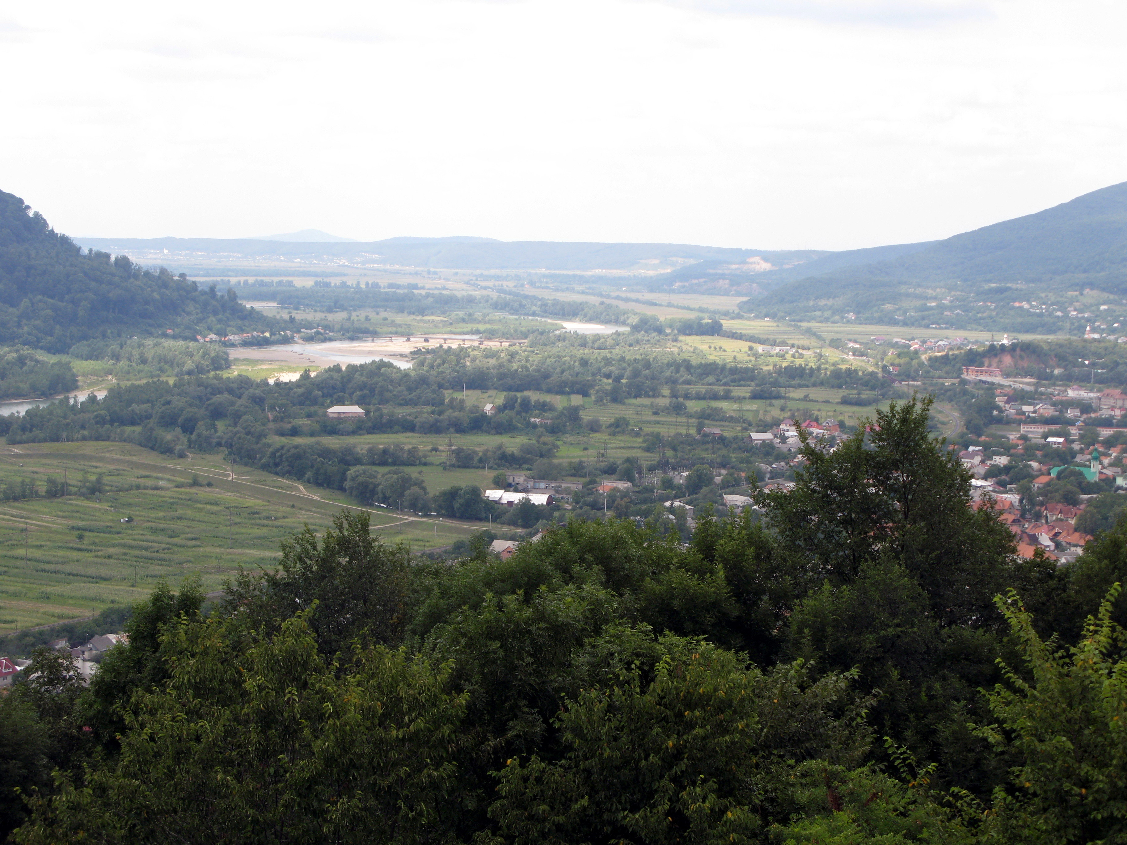 Руїни замку (мур.), Хуст